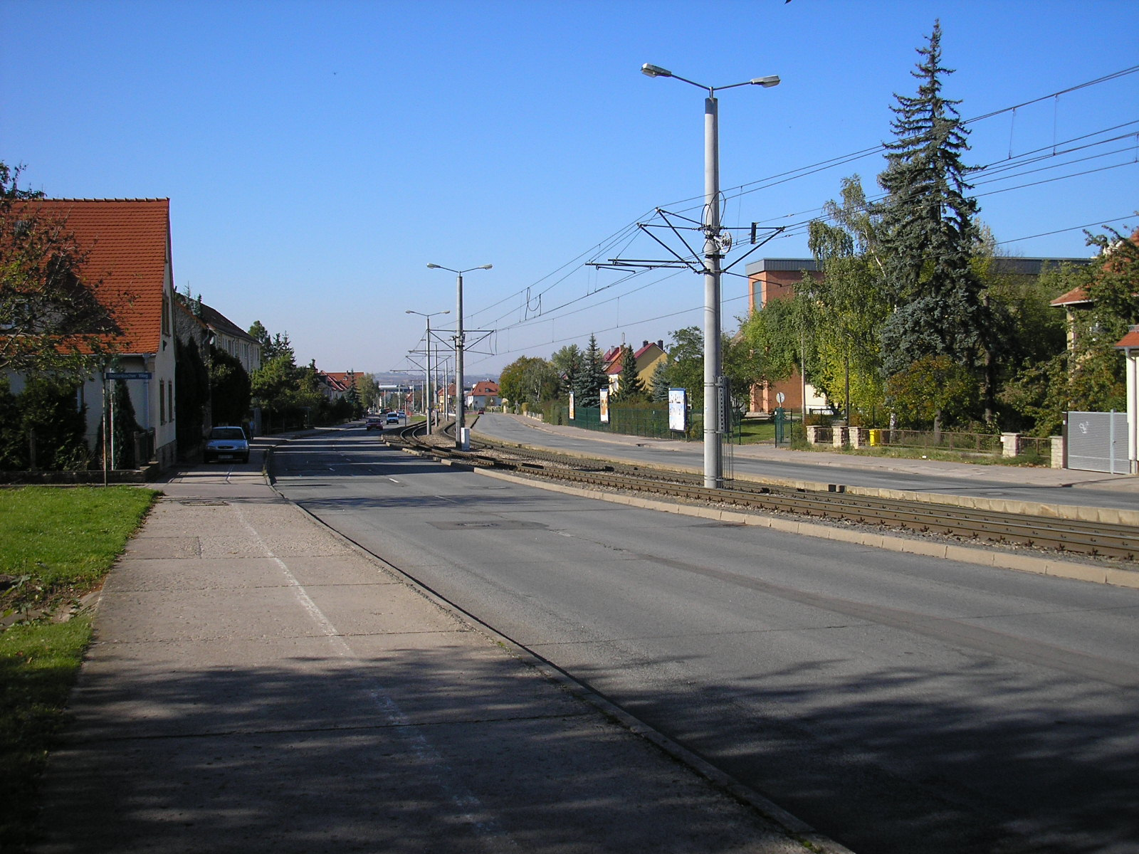 Die Kranichfelder Straße in Erfurt.